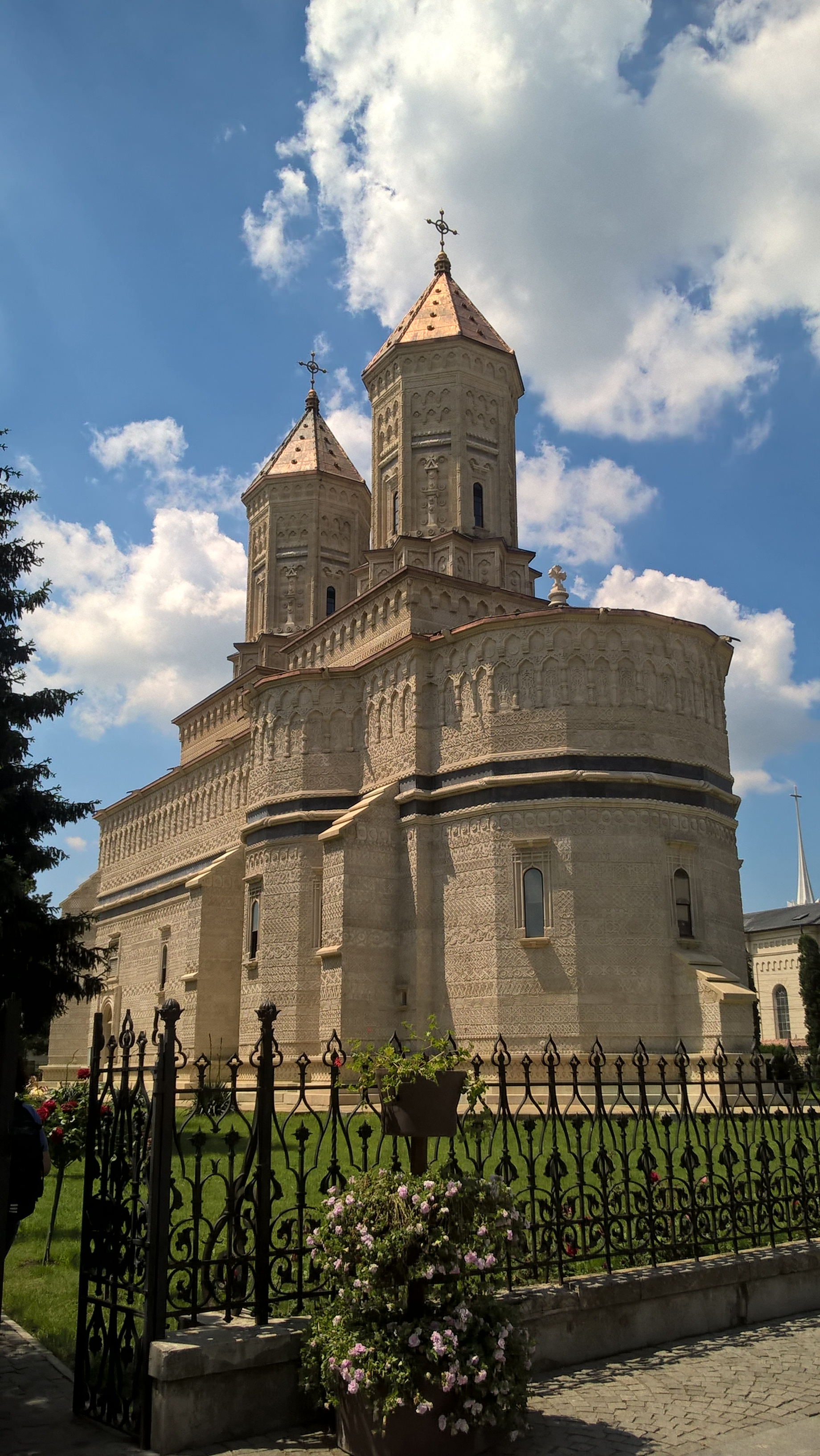 Cerkiew Trzech Świętych Hierarchów w Jassach widziana od strony południowo-wschodniej